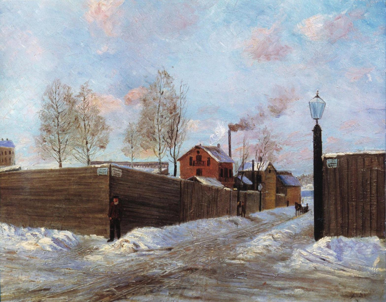 Nathalie Martinaun maalaus talvisesta katunäkymästä Helsingissä.